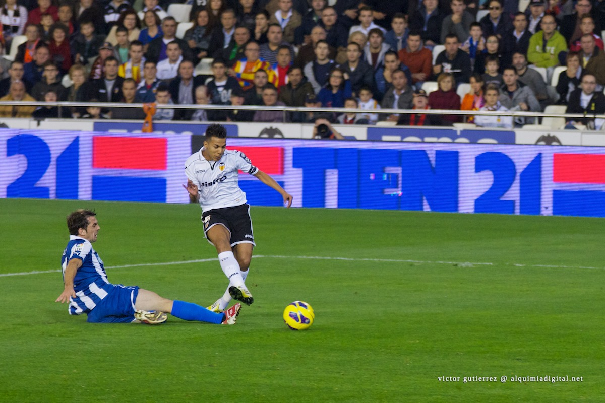 Jonathan Viera dispara para superar al guardameta del Español